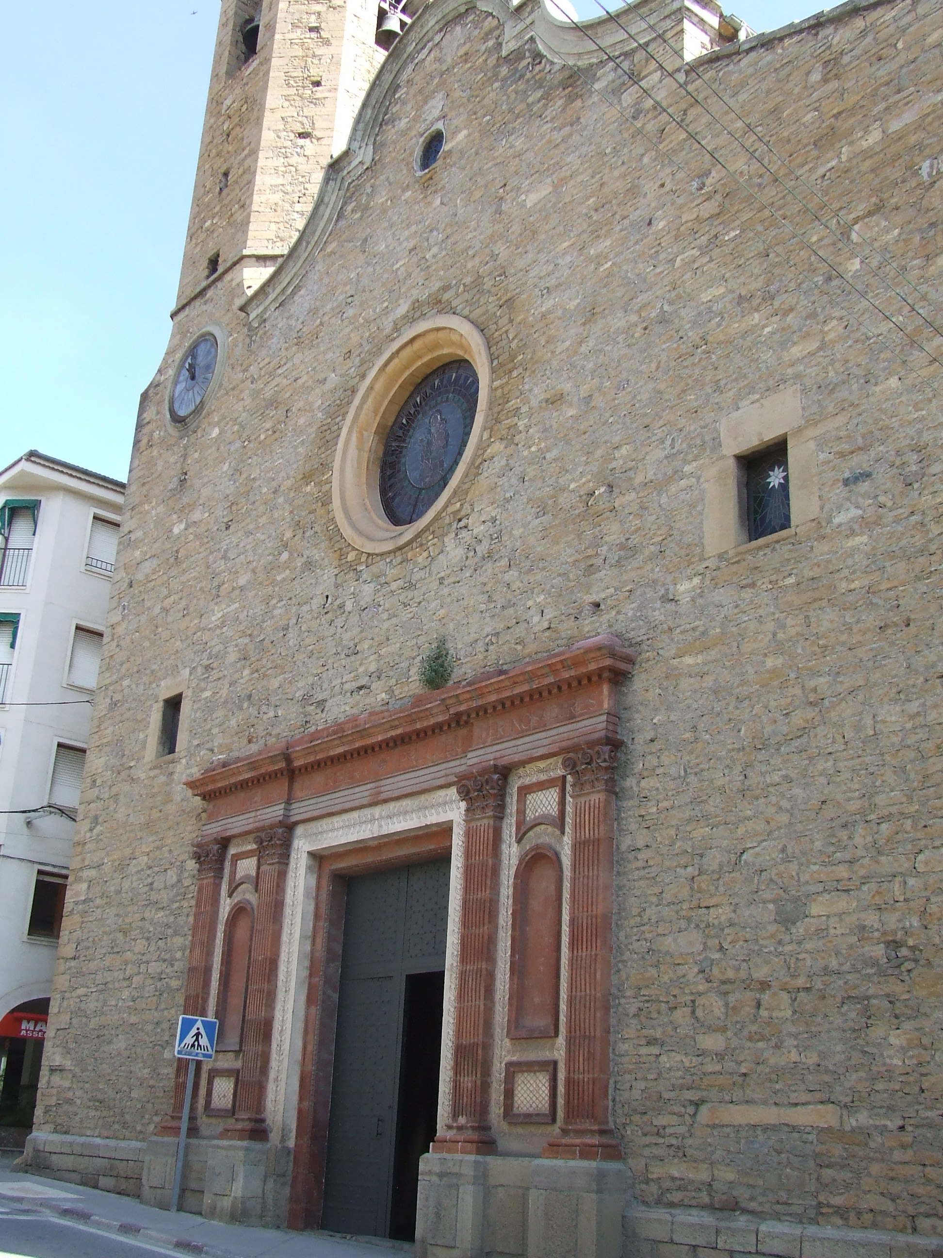 Mare de Déu de la Ribera de la Pobla de Segur (Pallars Jussà)